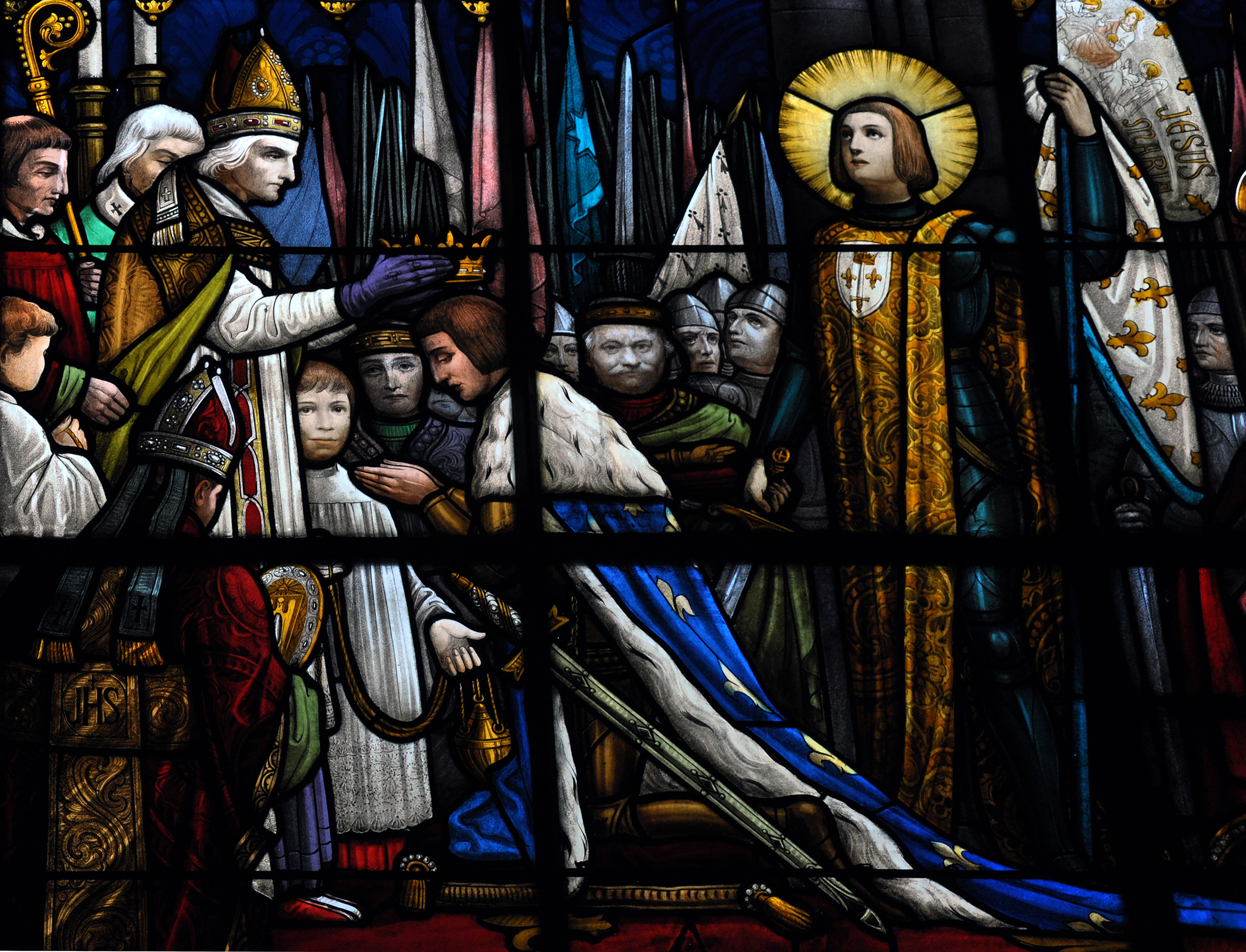 Vitrail de l'église Saint-Martin à Metz: le sacre de Charles VII en présence de Jeanne d'Arc.